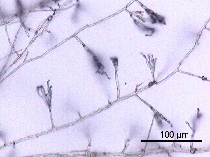 microscopic image of Penicillium sp. (environmental isolate). Magnification:200